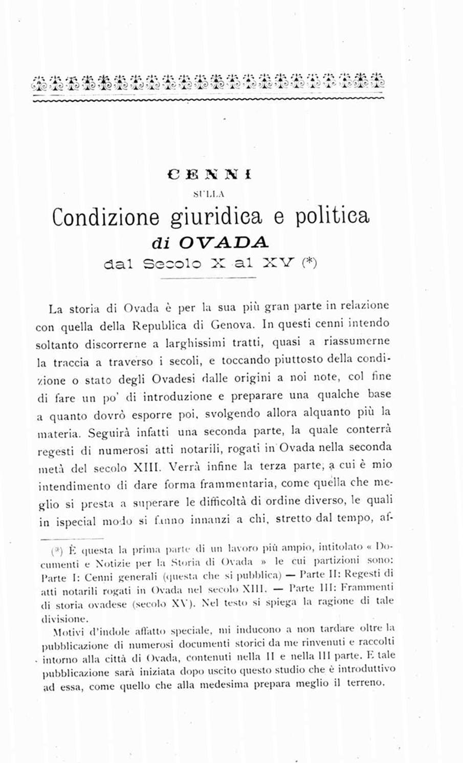 pagina 327